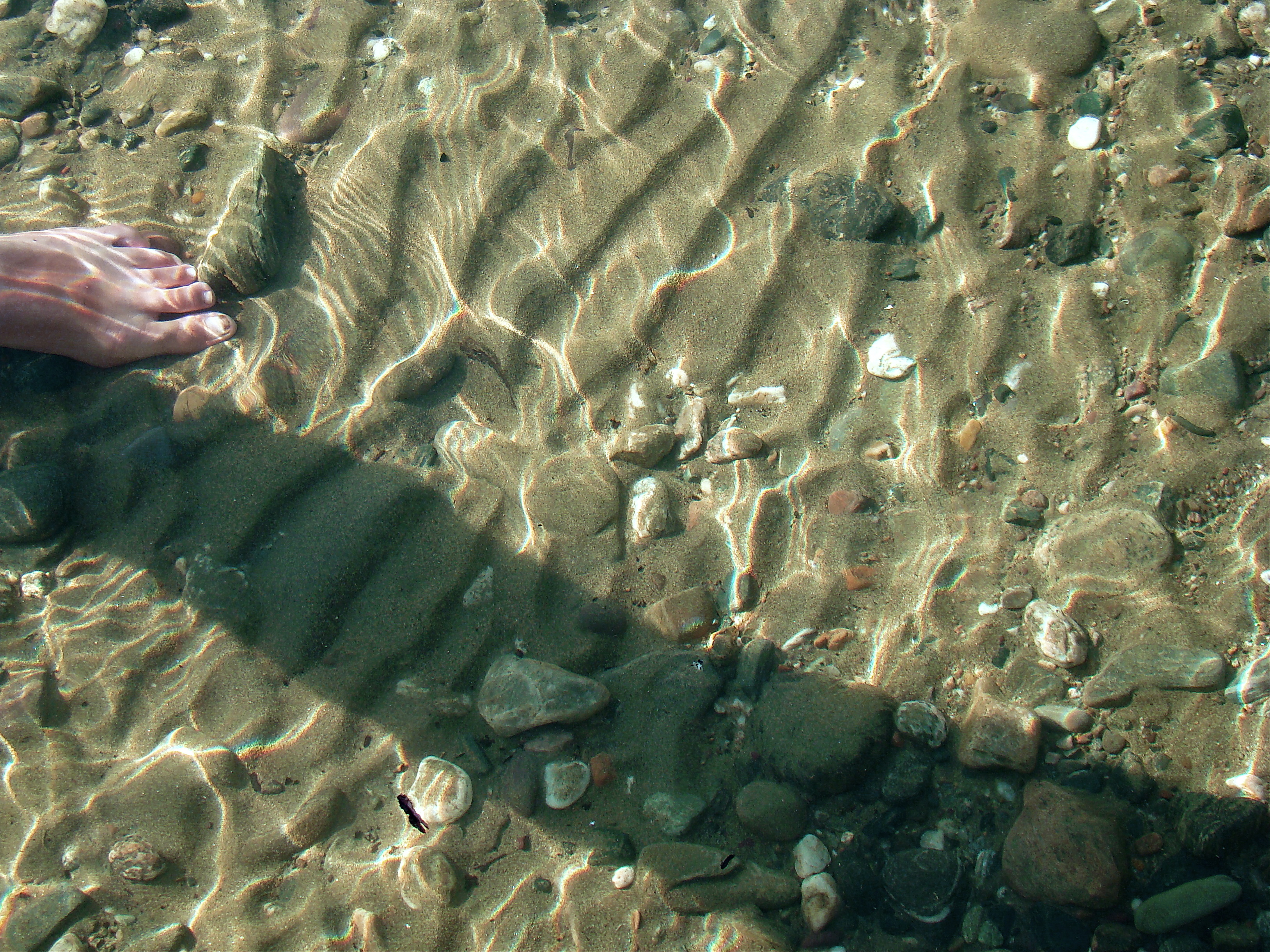 Мелкие, "обычные", песчаные знаки ряби в полосе вдольбереговых течений на пляже Телецкого озера, Алтай.